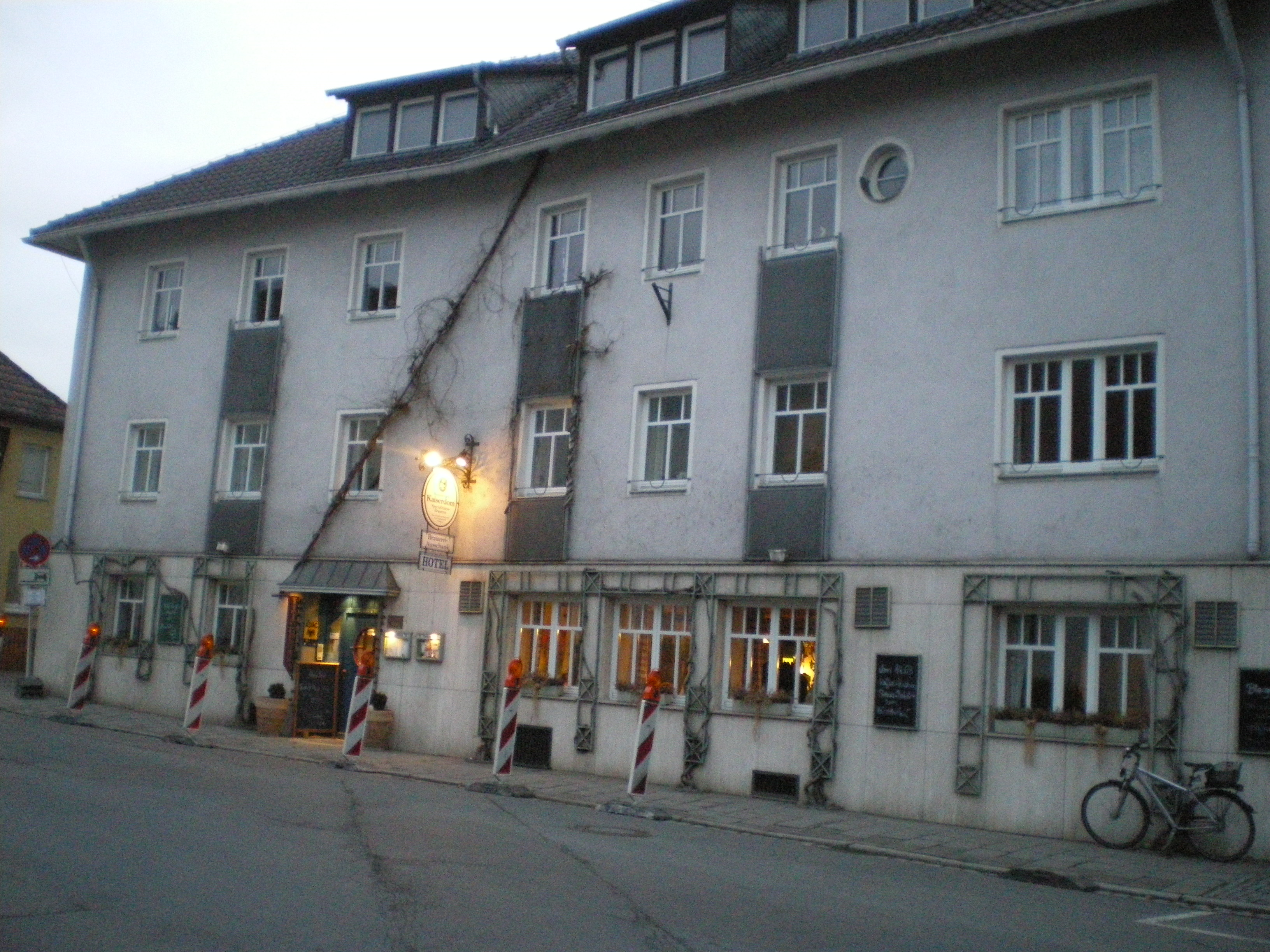 Brauereigasthof und Hotel Kaiserdom